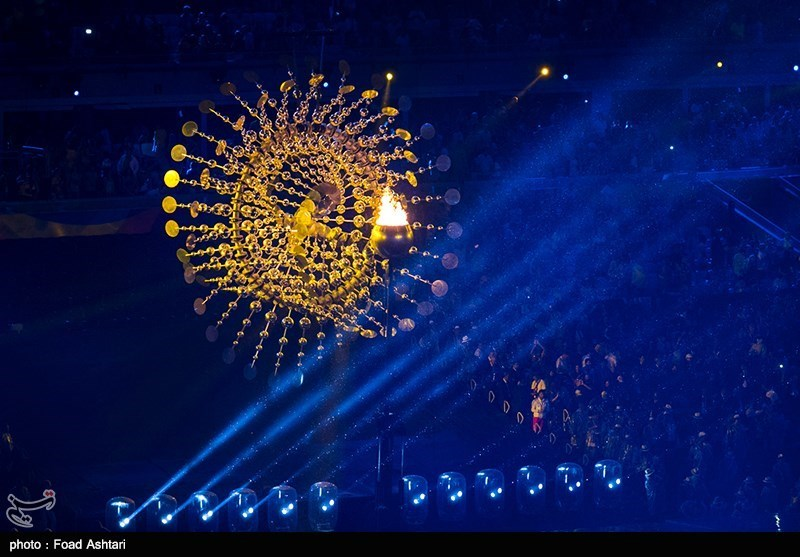 2016 Summer Paralympics opening ceremony